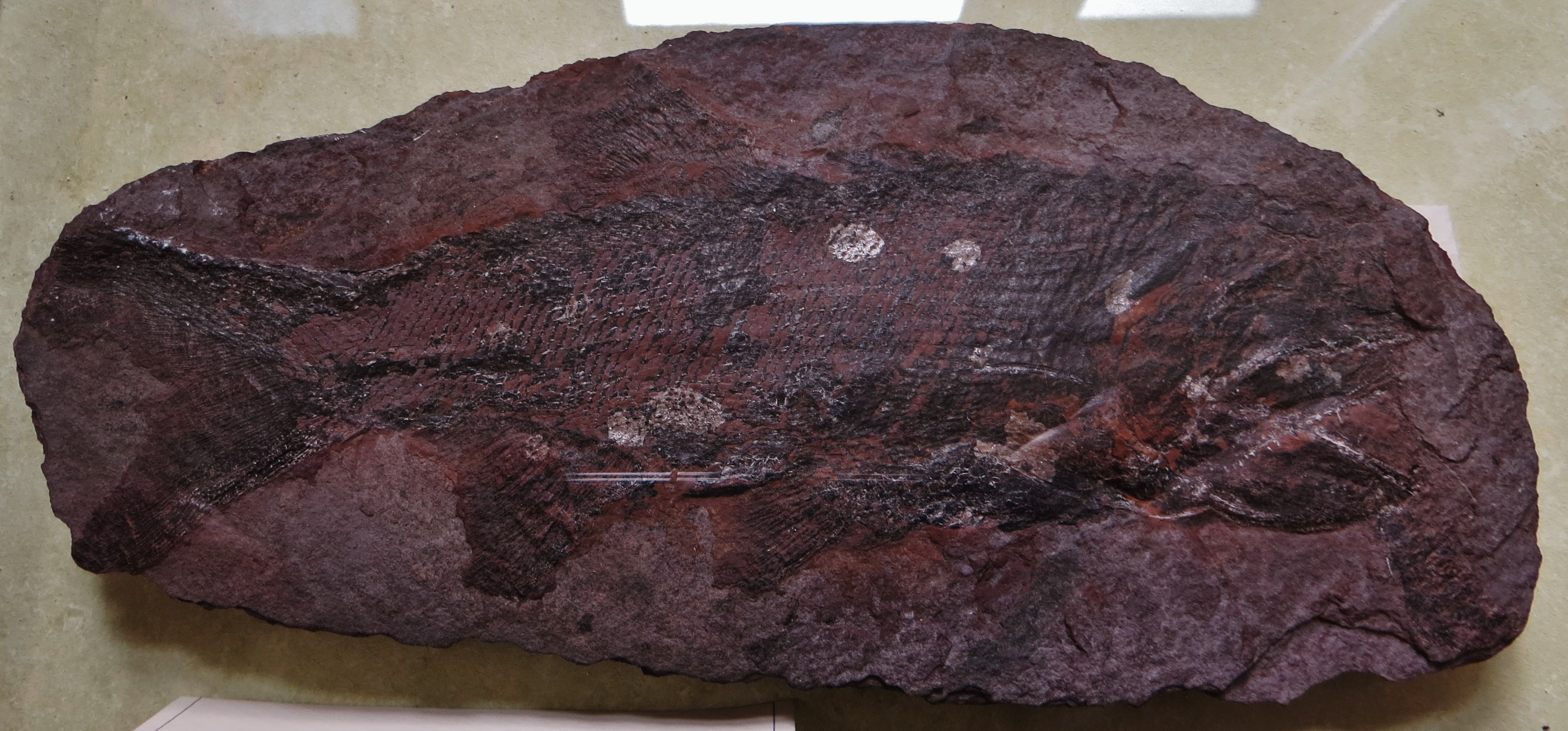 Fossil fish - Took the picture at Natural History Museum, Bonn University